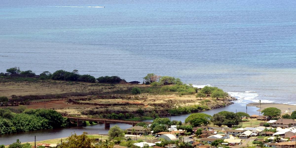 Иллюстрация для викиучебника Гавайеведение